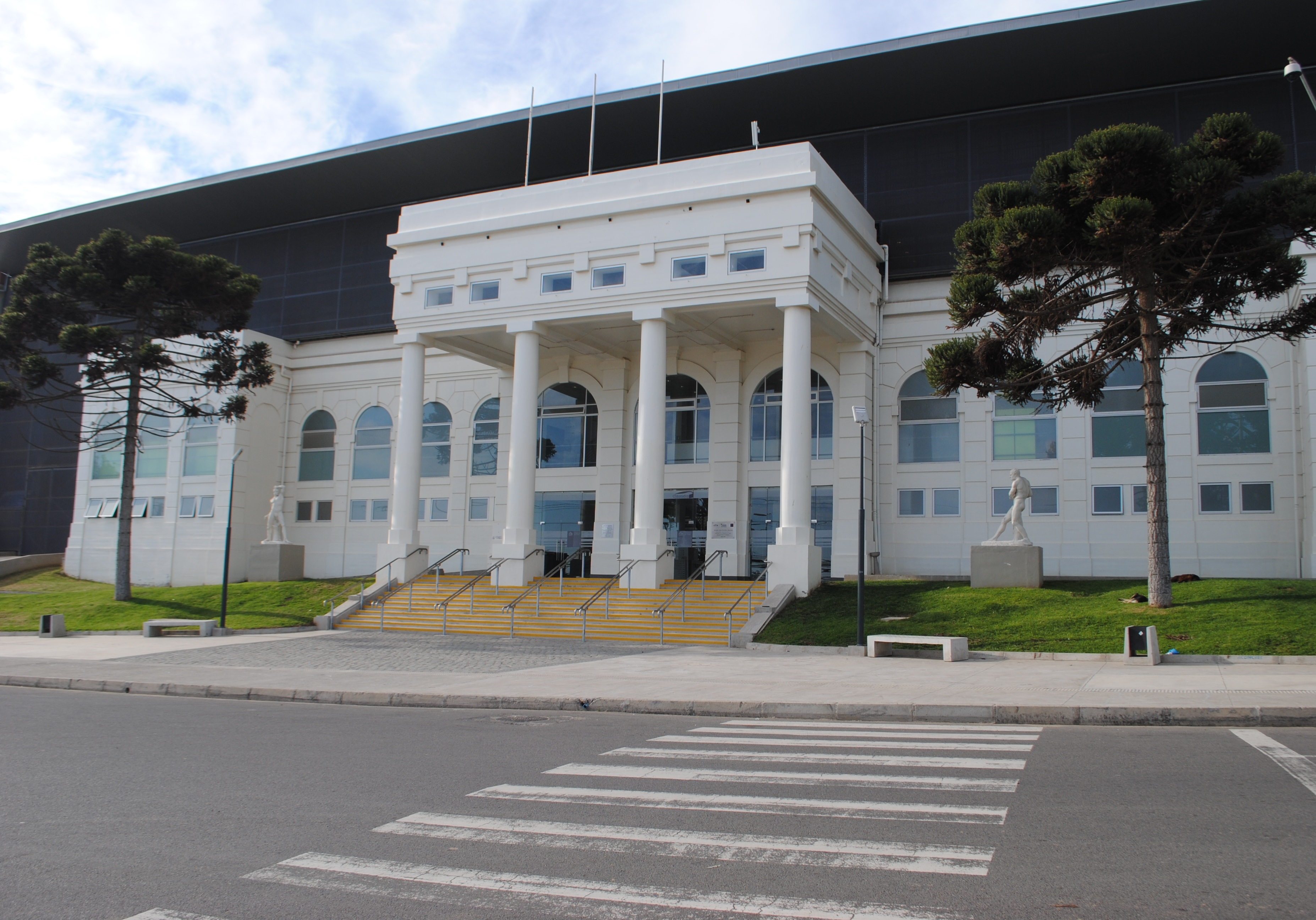 Frontis del Estadio Elías Figueroa Brander, ubicado en Playa Ancha, Valparaíso, Chile.